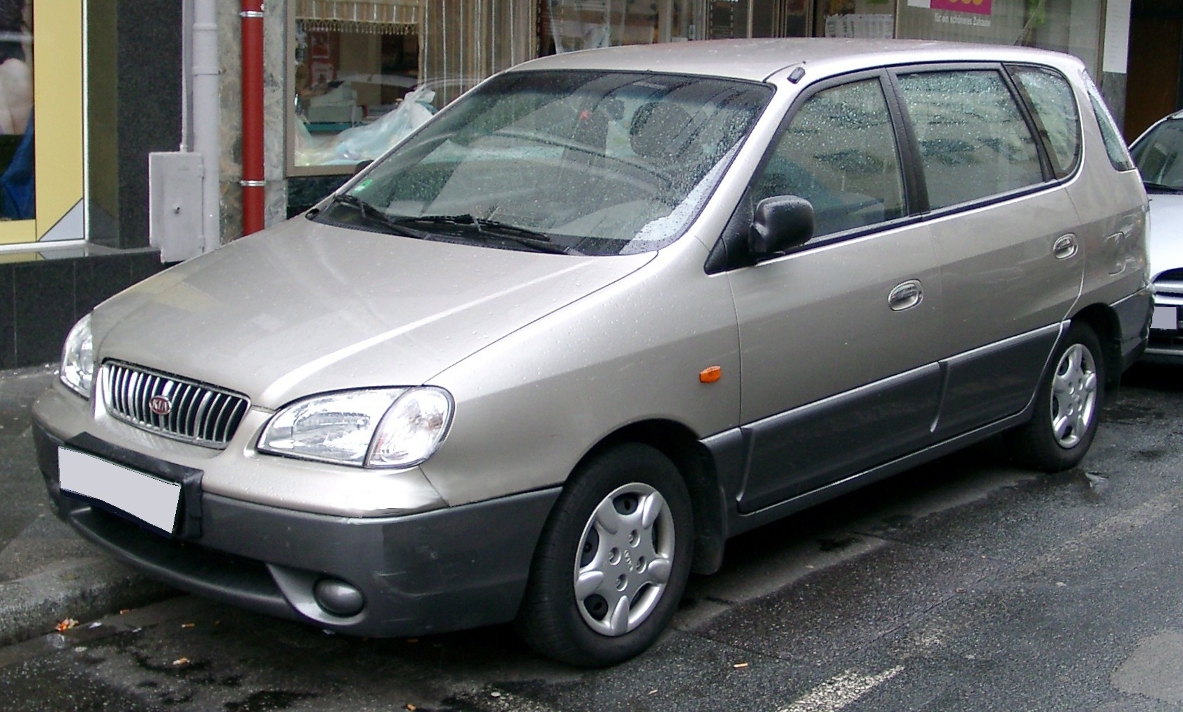 Kia Carens